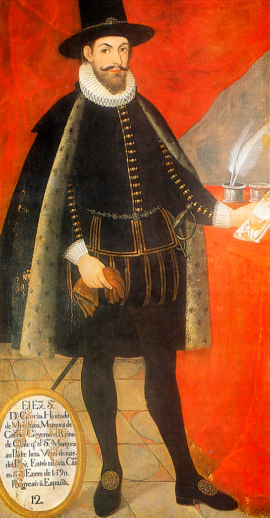 García Hurtado de Mendoza, IV marqués de Cañete (1535 - 1609) Gobernador de Chile y Virrey del Perú.